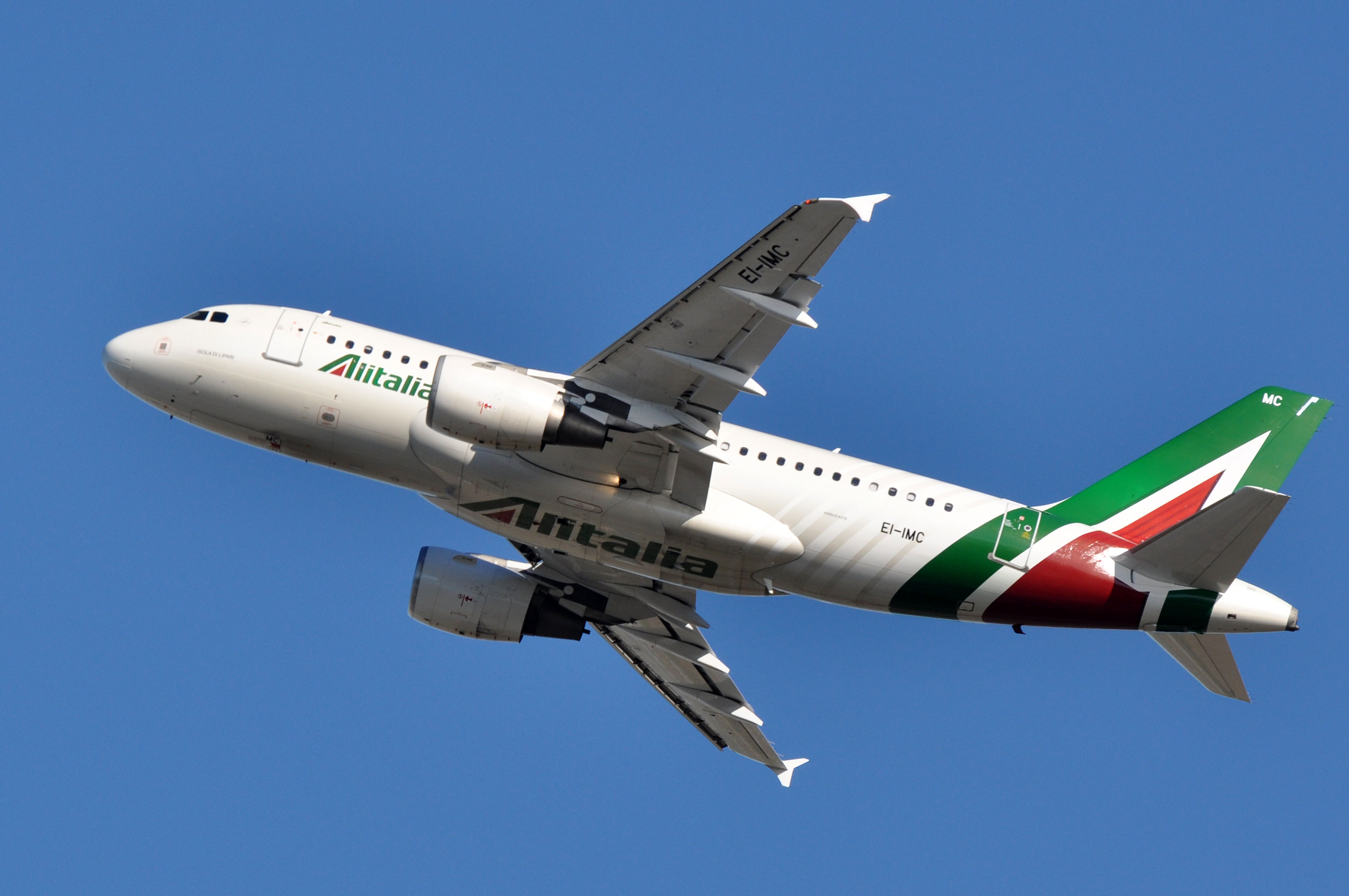 MSN 2057 A319-112 ALITALIA FCO AIRPORT EX ALITALIA AS I-BIMC